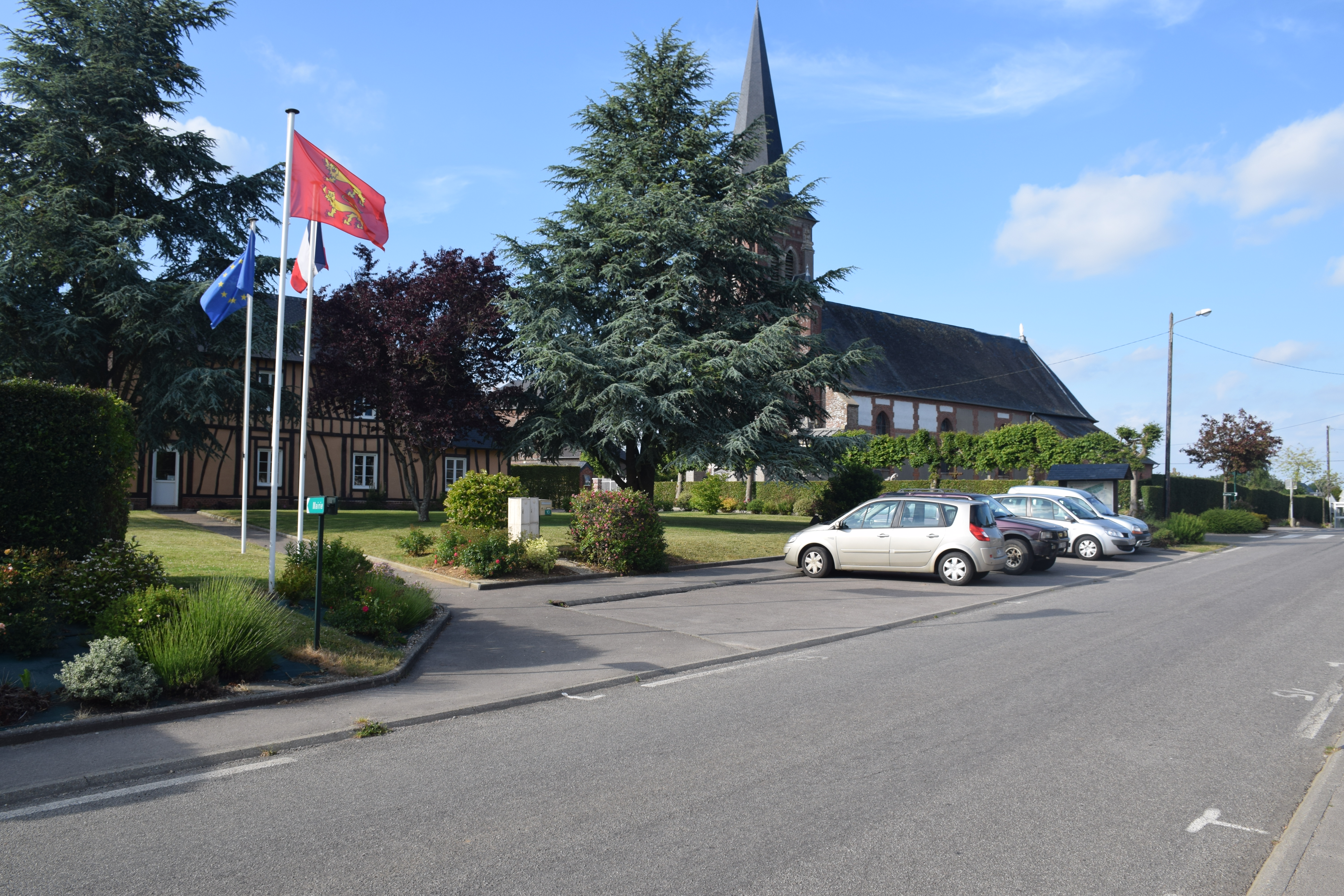 Mairie et Eglise